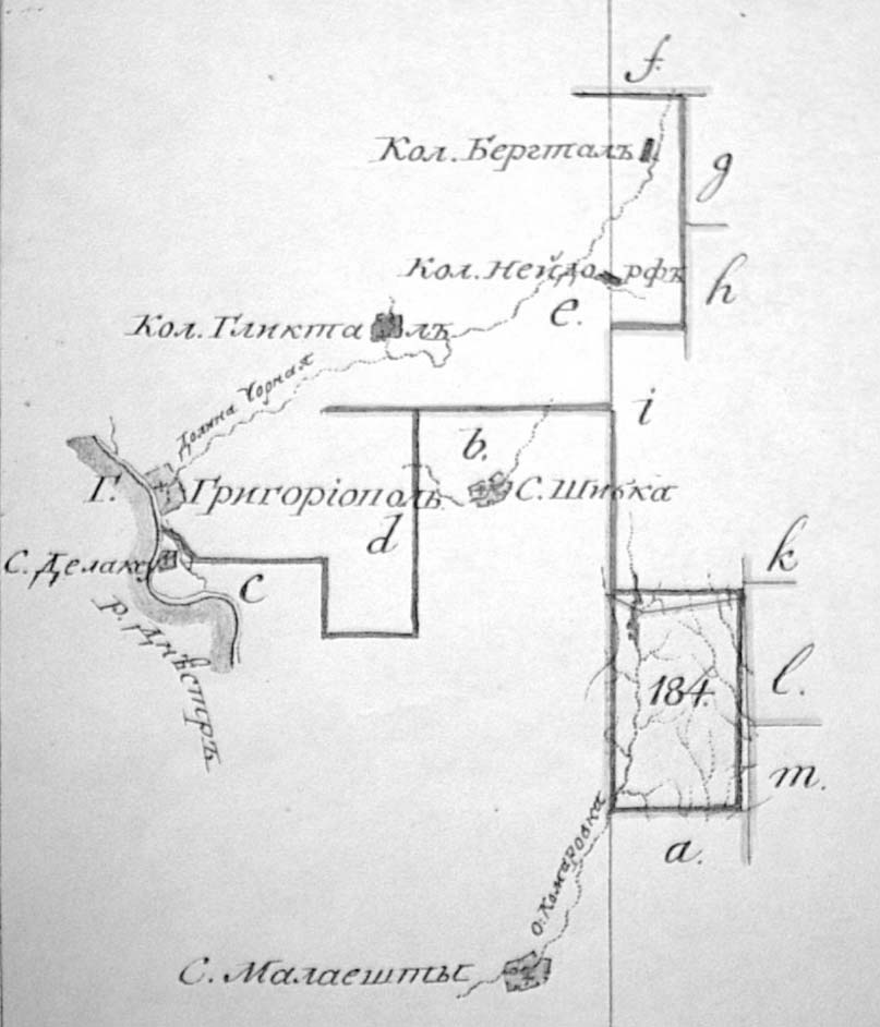 Glückstal Kolonistenbezirk mit Ländereien für die Kolonie Kassel